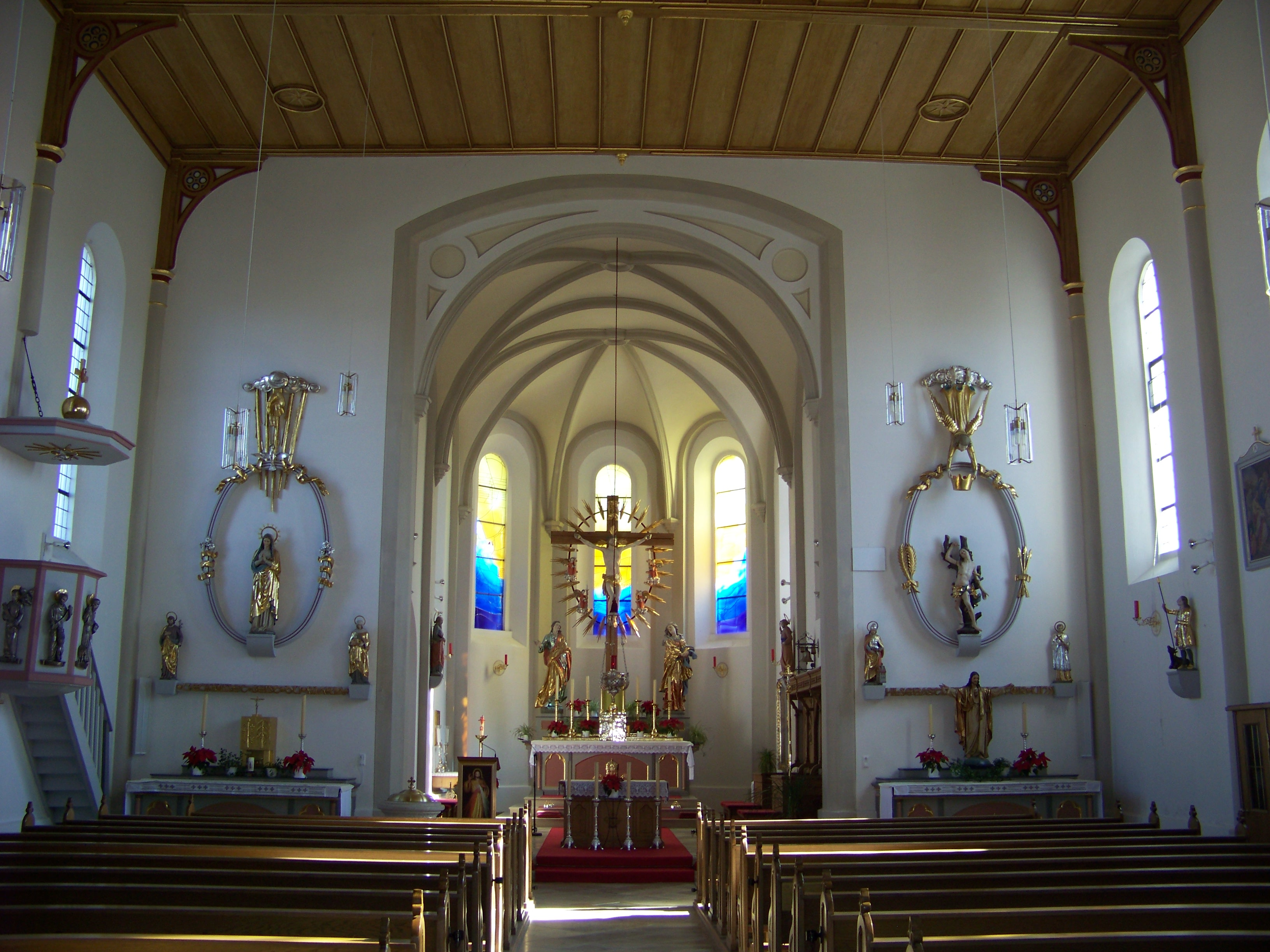 Laberweinting, Hofkirchen 77. Pfarrkirche St. Peter. Innenraum.